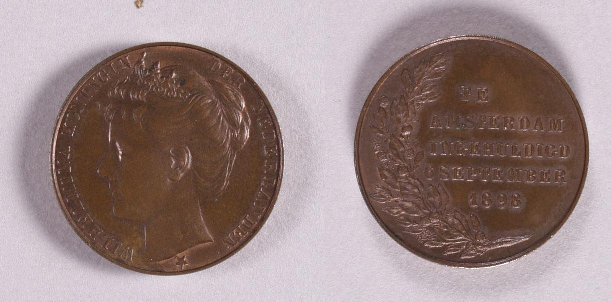 Dubbele afbeelding van een penning ter ere van het kroningsjaar van koningin Wilhelmina. Het ontwerp is afkomstig van de Friese beeldhouwer en etser Pier Pander. Gelieve deze afbeelding niet te gebruiken zonder bronmateriaal en herkomst van afbeelding aan te geven